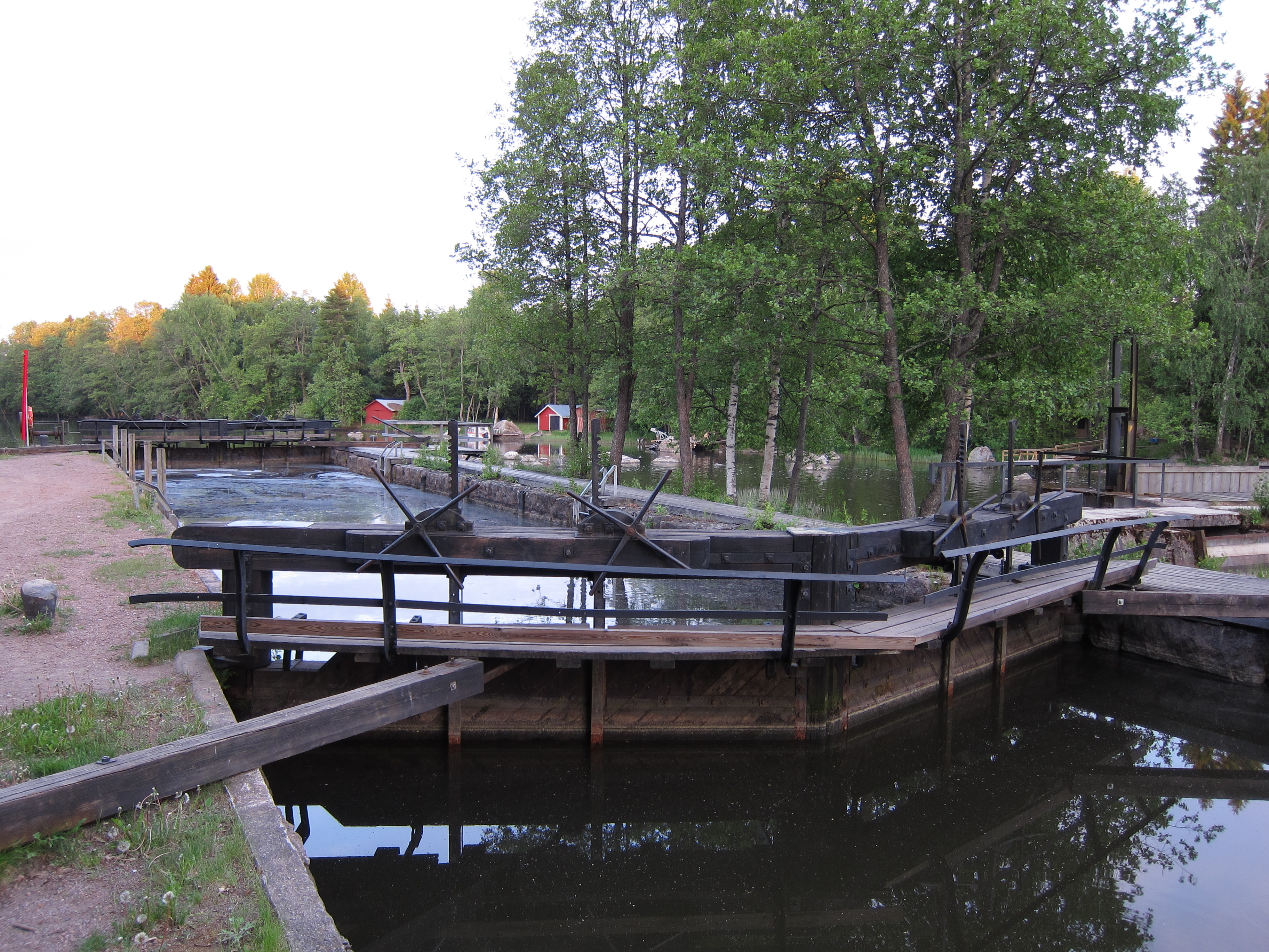 Strukan kanava Kymijoen Pyhtäänhaarassa Pyhtään kunnassa.